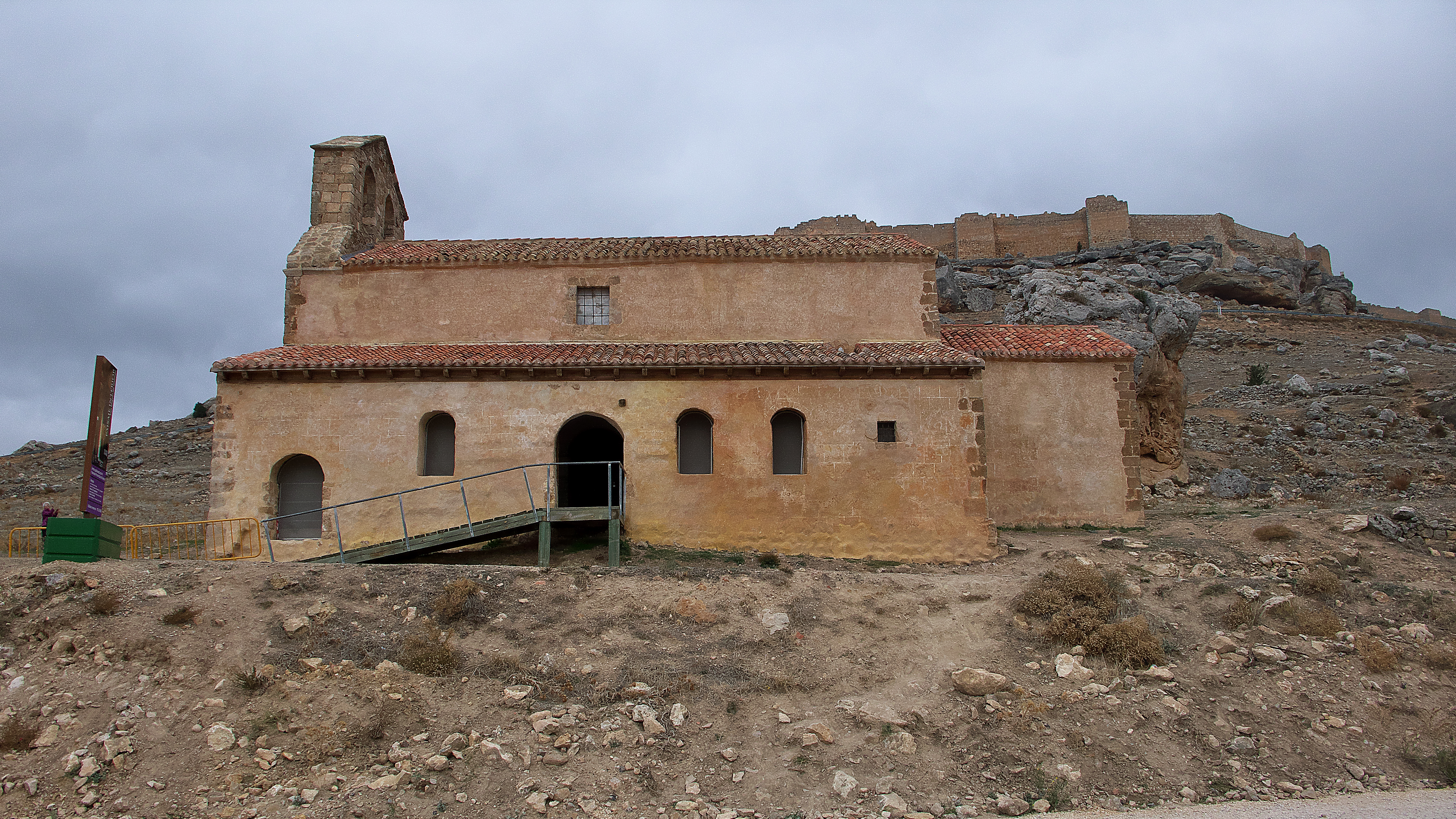 La ermita de San Miguel de Gormaz. ¿Un enclave comprensible? A tiro de piedra, una fortaleza califal. Situada, estratégicamente, en la frontera del Califato de Córdoba. Con Fernando I de León, la zona queda estabilizada. San Pedro de Osma y Alfonso VI de León impulsan el arte románico, el arte de repoblación.